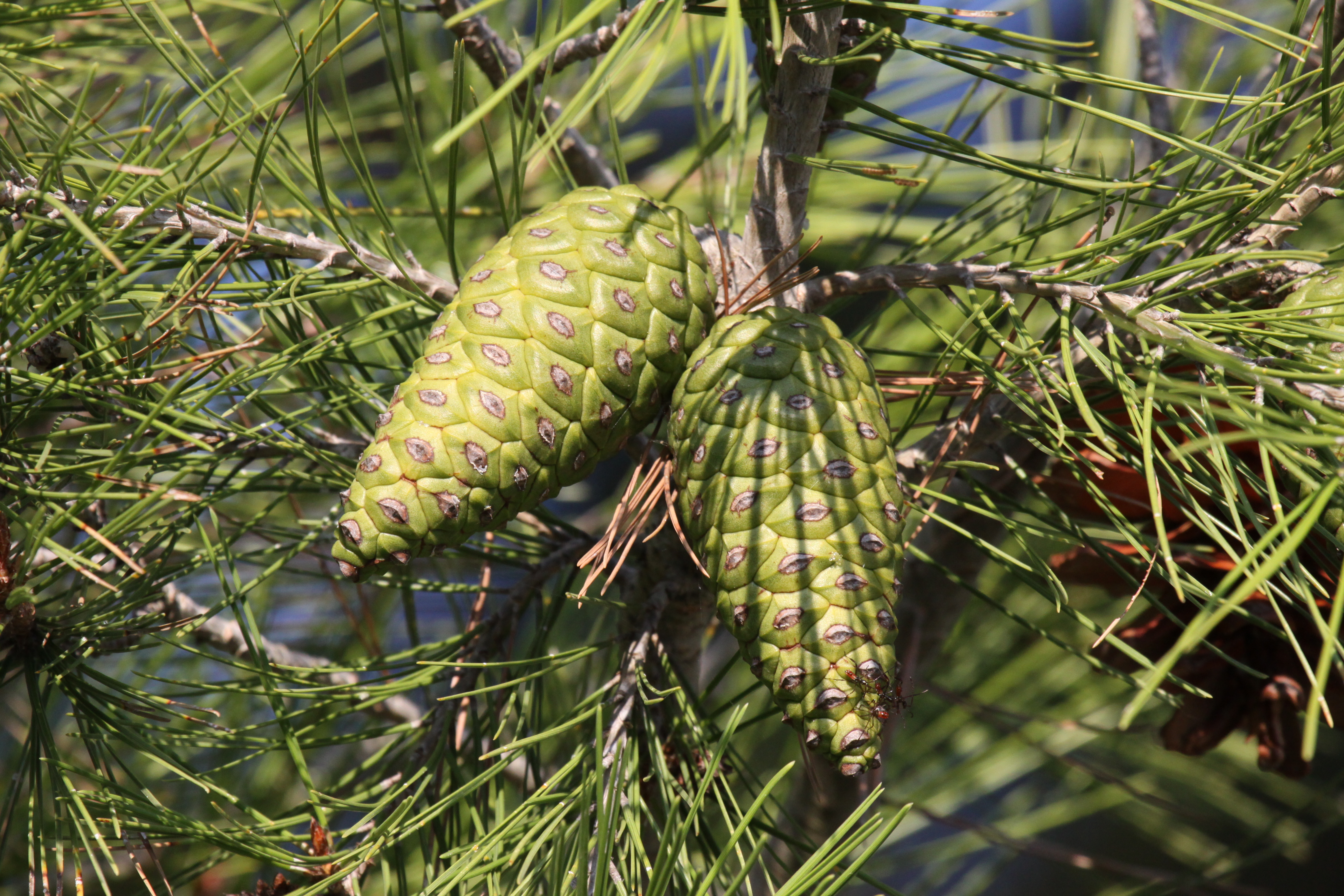 Deux cônes de pin d'alep. Ces cônes (appelés plus communément "pommes de pin") encore verts sont en train de mûrir. Ils sont de forme ovoïde et se présentent par deux. Cette photographie a été prise dans l' Île de Ré (France).